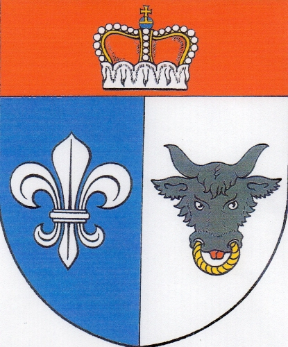 znak,Velké Janovice , okres Žďár nad Sázavou